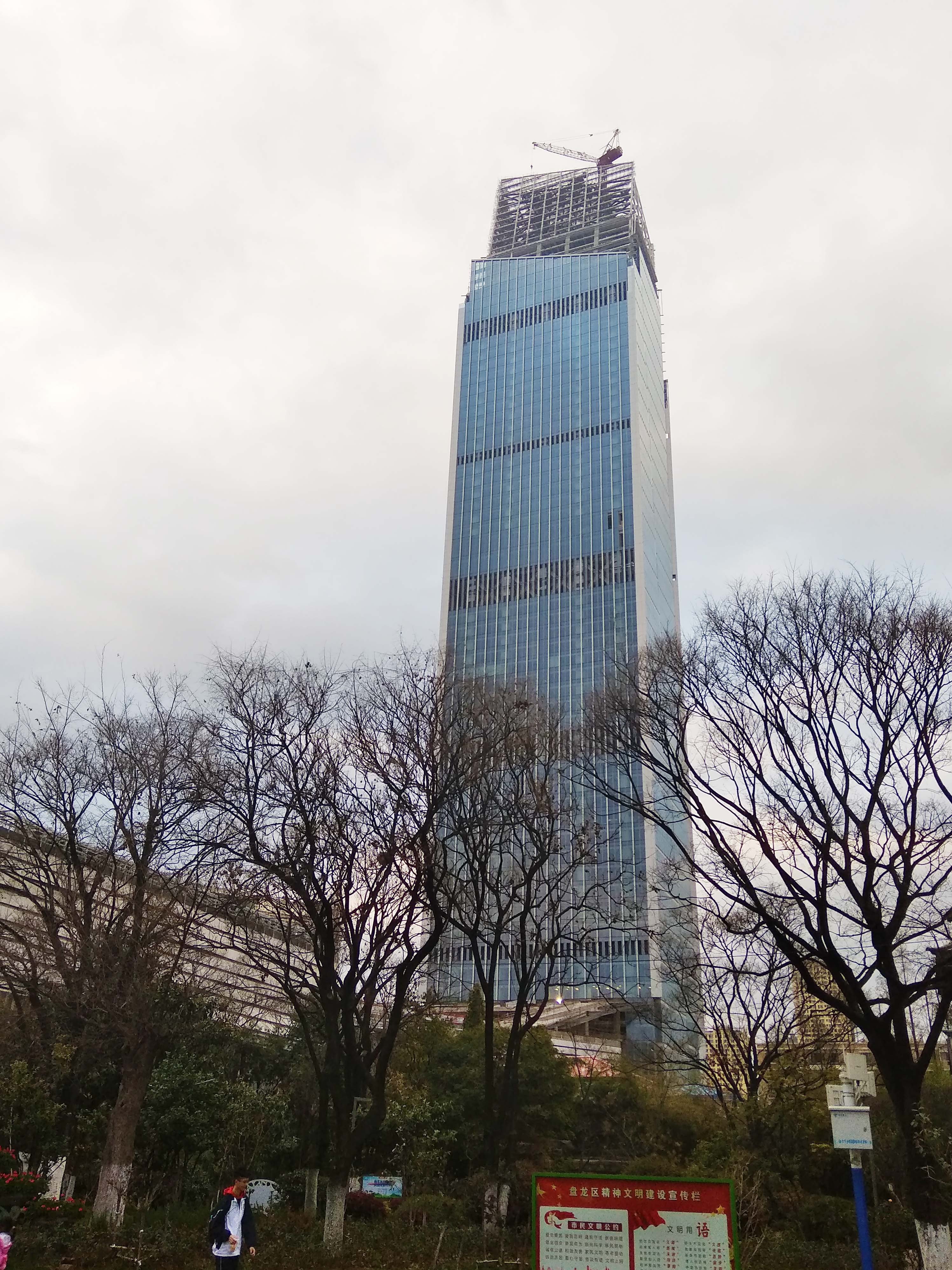 正在建设的昆明恒隆广场主楼，拍摄于2019年2月22日。